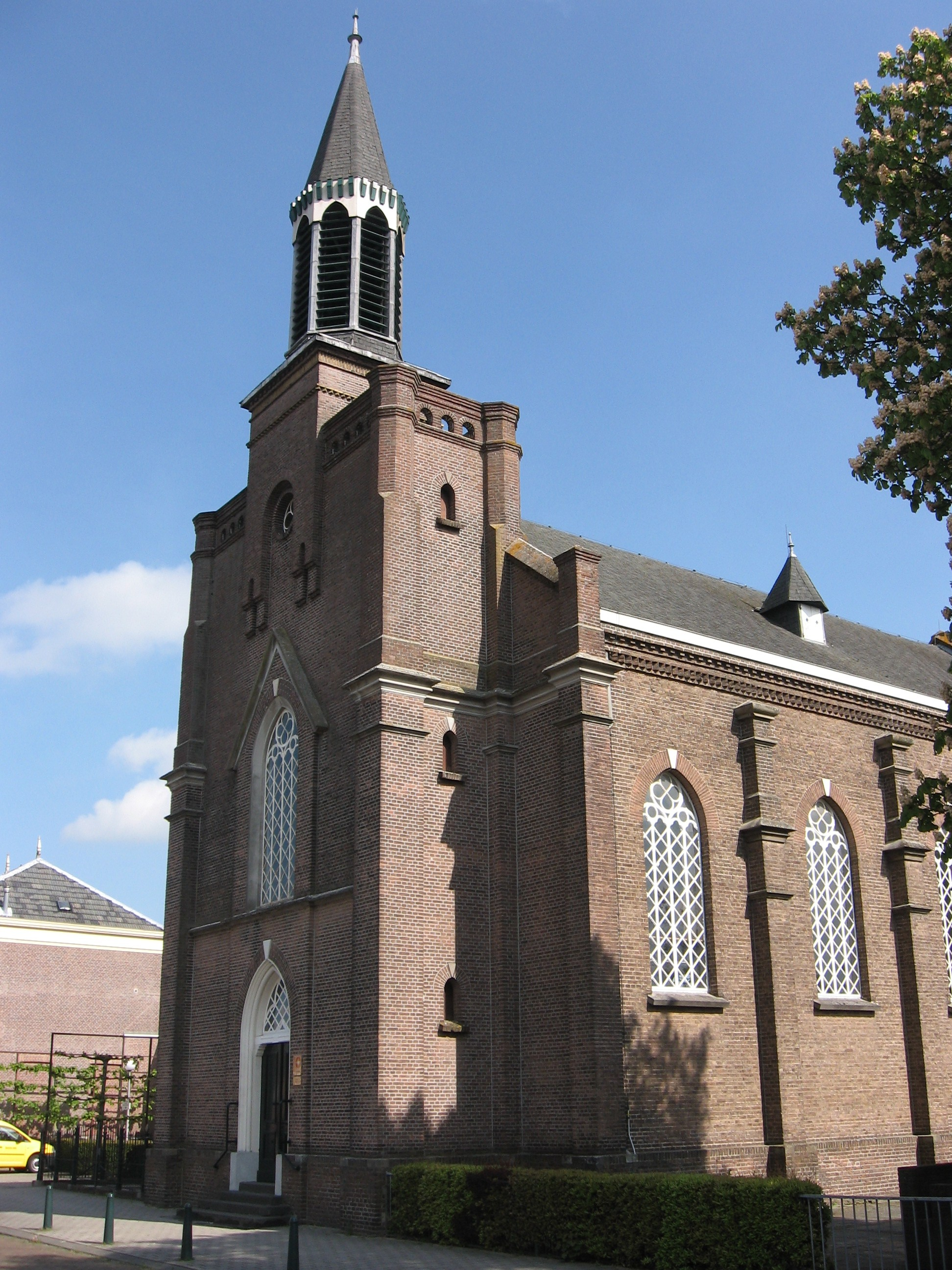 Raamsdonksveer - RM520053.jpg, rijksmonument